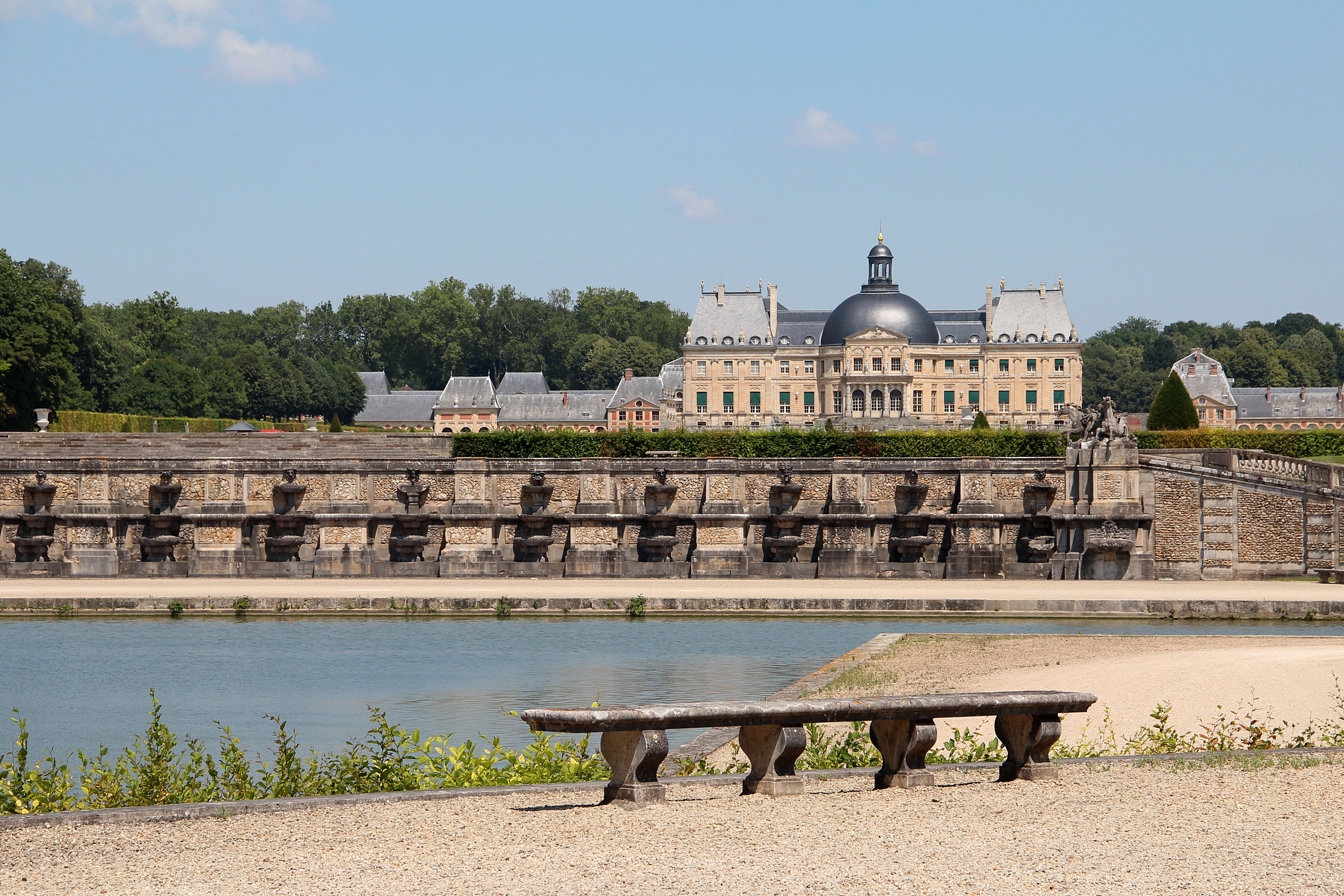 Bassin des Grandes cascades et château de Vaux-le-Vicomte - Maincy (Seine-et-Marne, France).